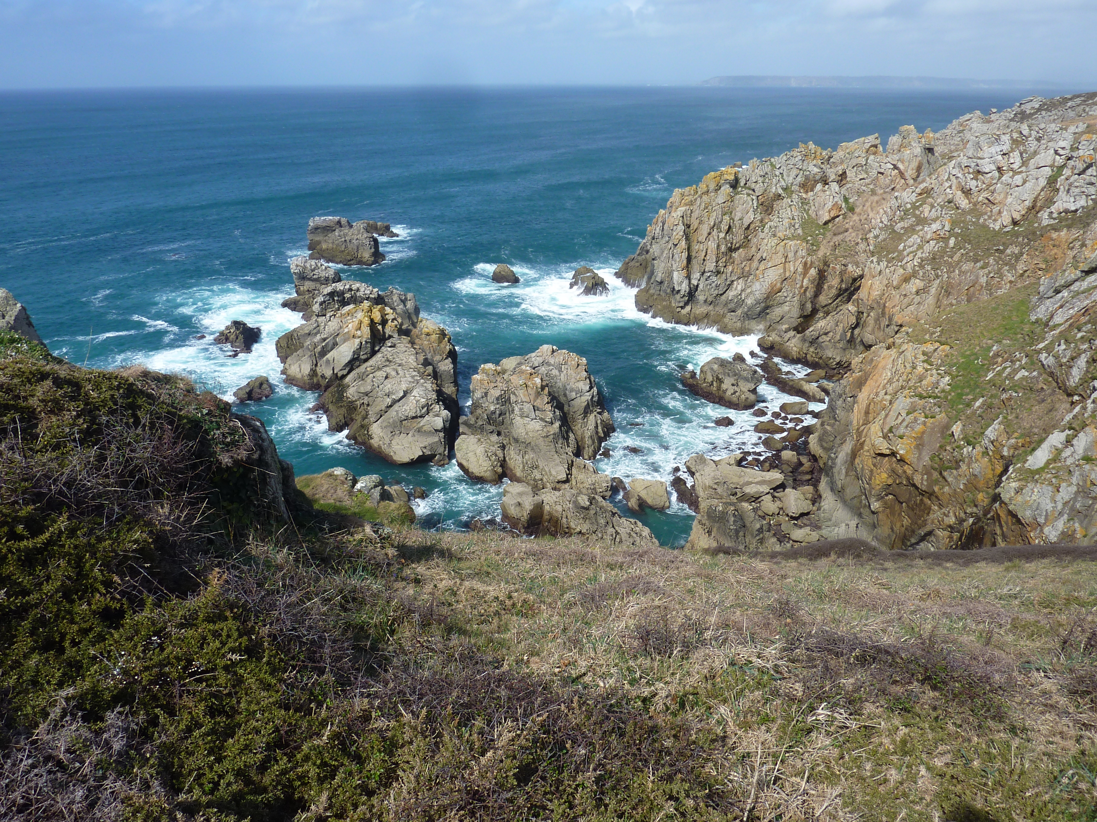 Beuzec-Cap-Sizun : rochers et falaises entre la Pointe de Luguénez et la Pointe de Lesven.